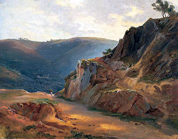 Johann Jakob Frey, Weg in den Bergen über Rom (um 1840)